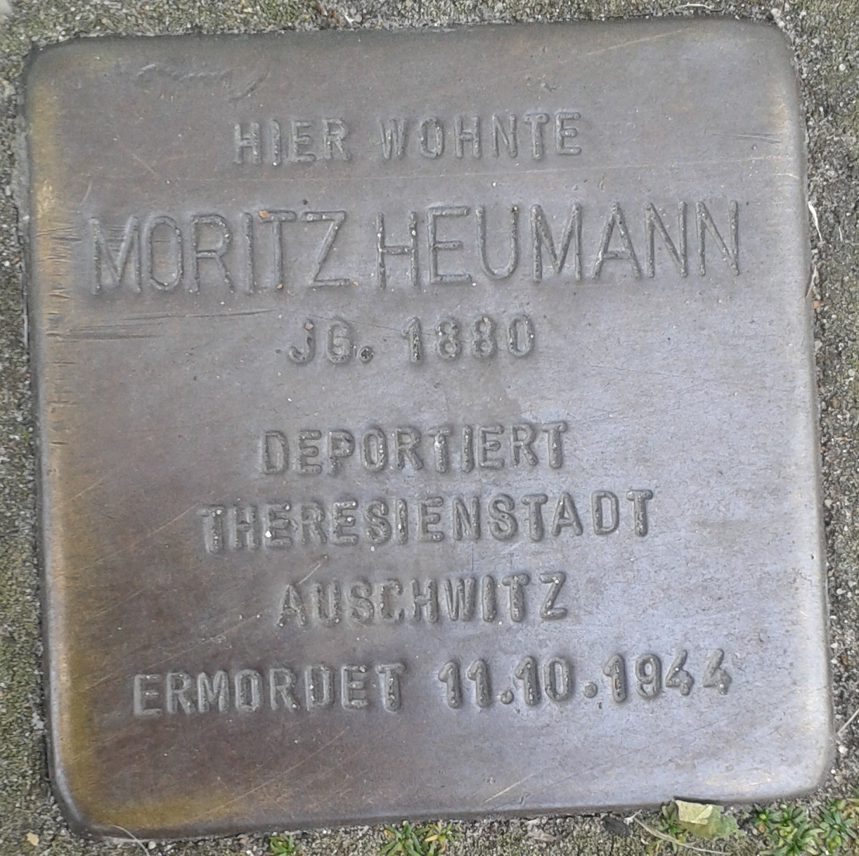 Stolperstein Selm Kreisstraße 80 Moritz Heumann